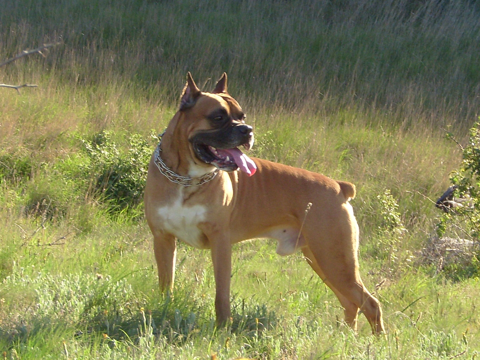 Боксёр